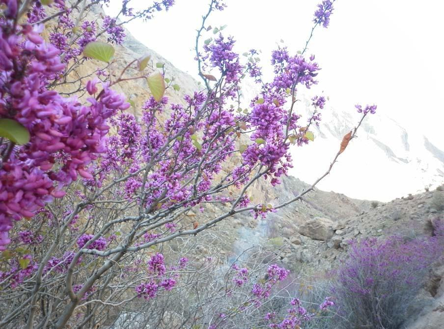 دره ارغوان - روستای علی‌آباد - کشمر ، شهرستان بردسکن